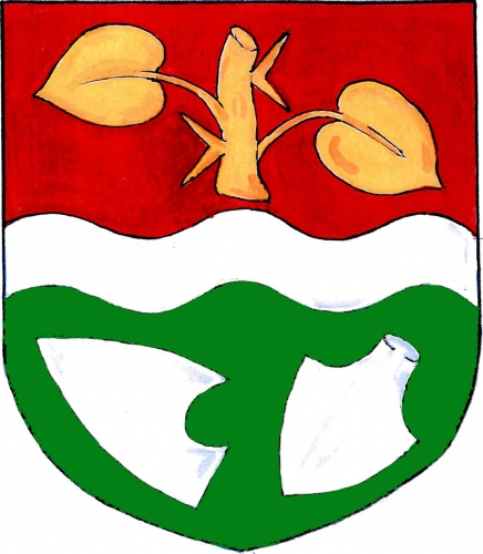 znak, Trnov, okres Rychnov nad Kněžnou